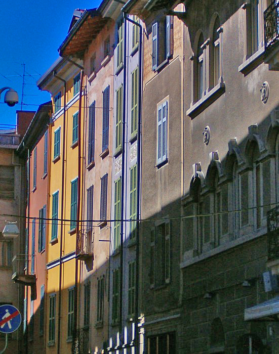 Varese.